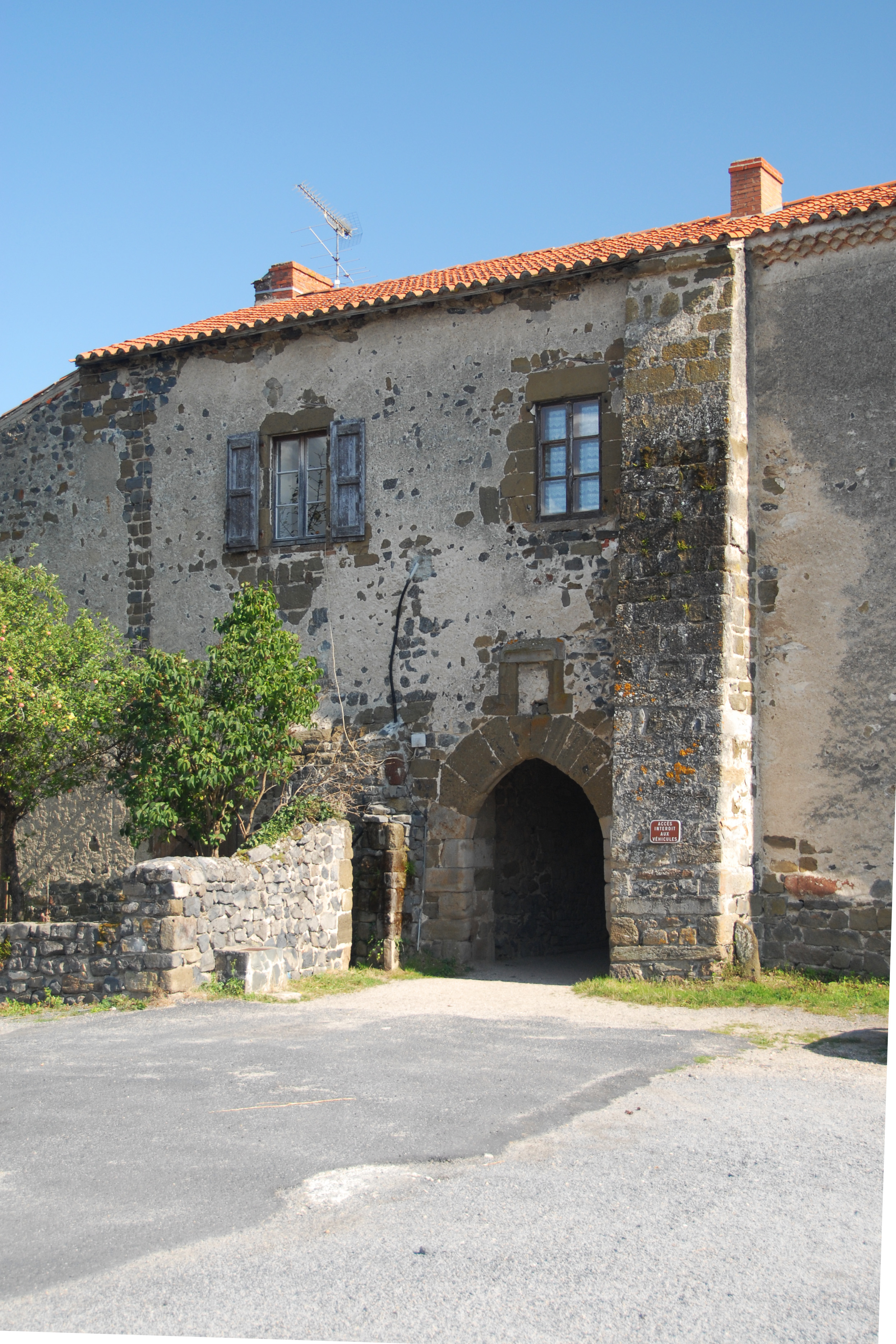 Chanteuges, Hauptportal in Nordflügel